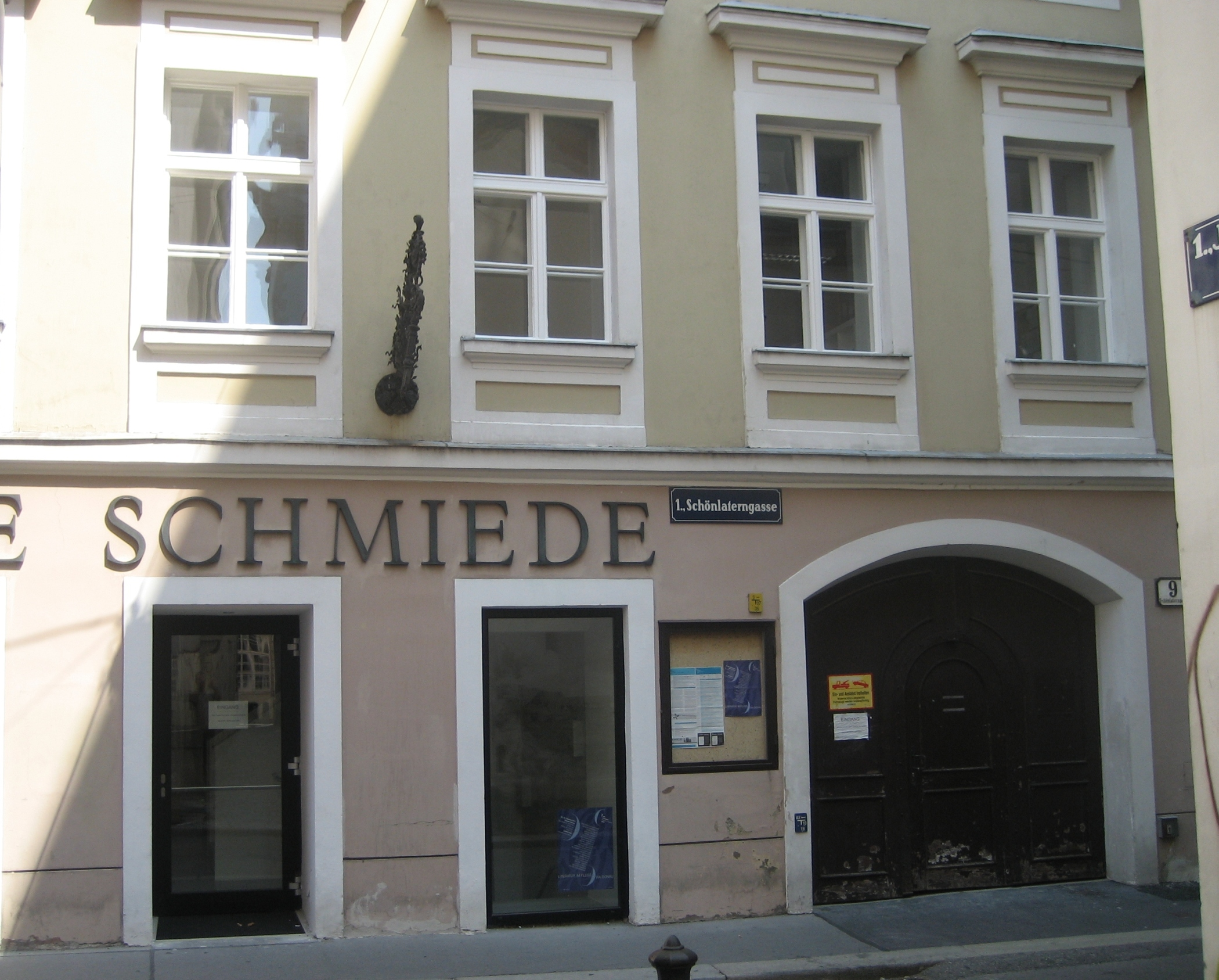 das Haus Schönlaterngasse 9 im 1. Bezirk, in Wien